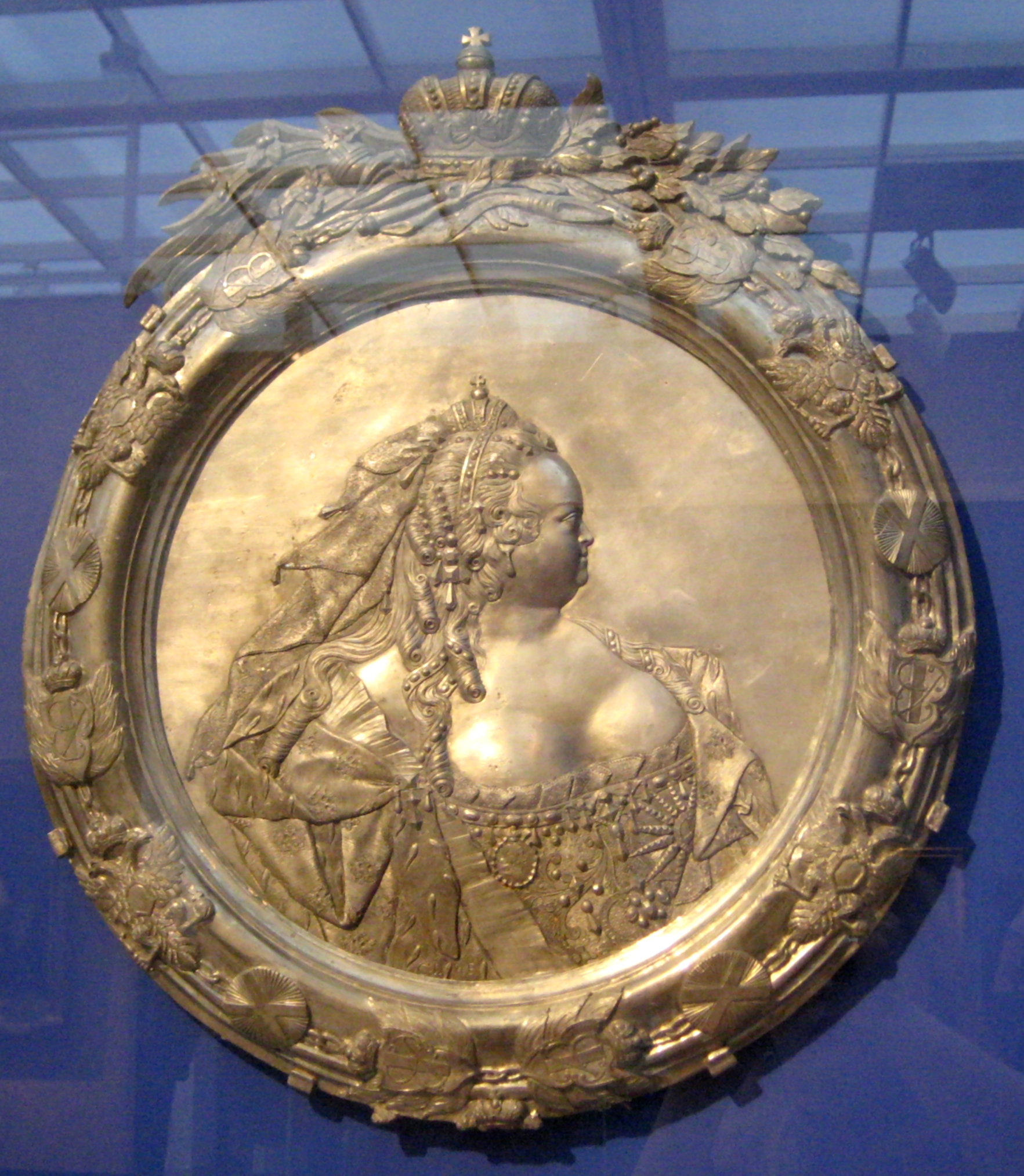 Бартоломео Карло Растрелли. Императрица Елизавета Петровна. Олово, 1740-е. Музеи Московского Кремля